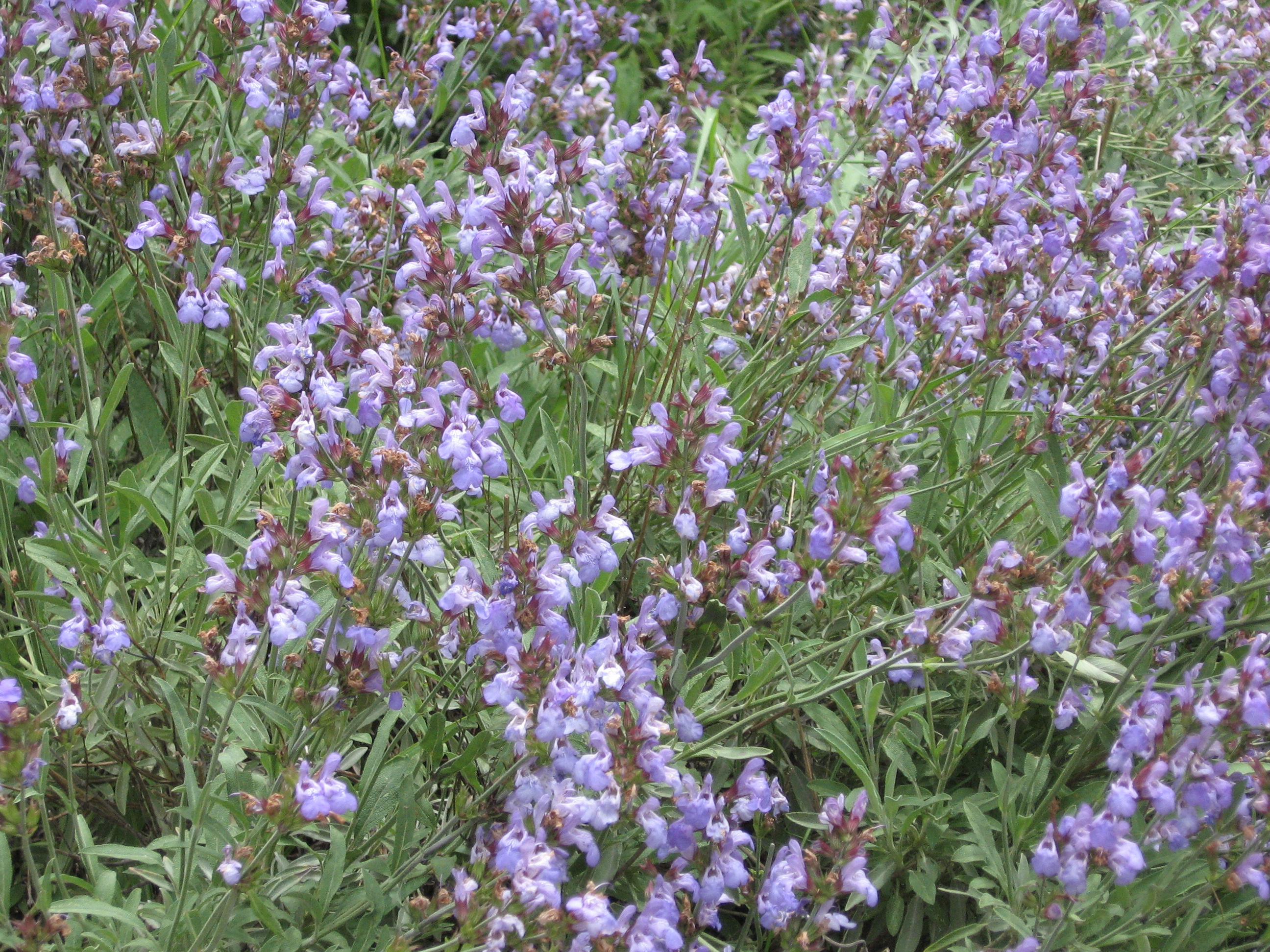 Salvia officinalis. Real Jardín Botánico de Madrid.